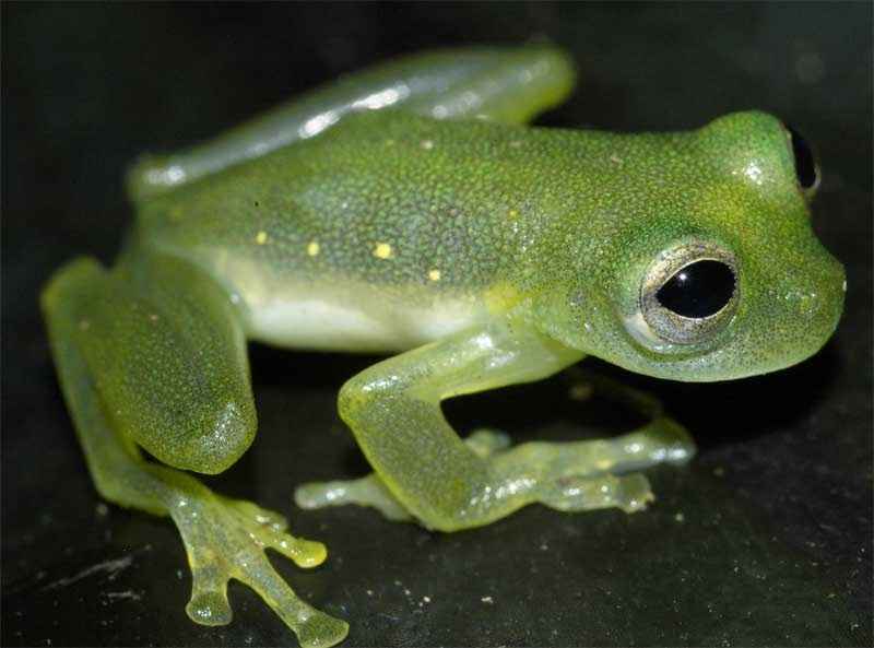 Teratohyla midas - Syn.: Cochranella midas